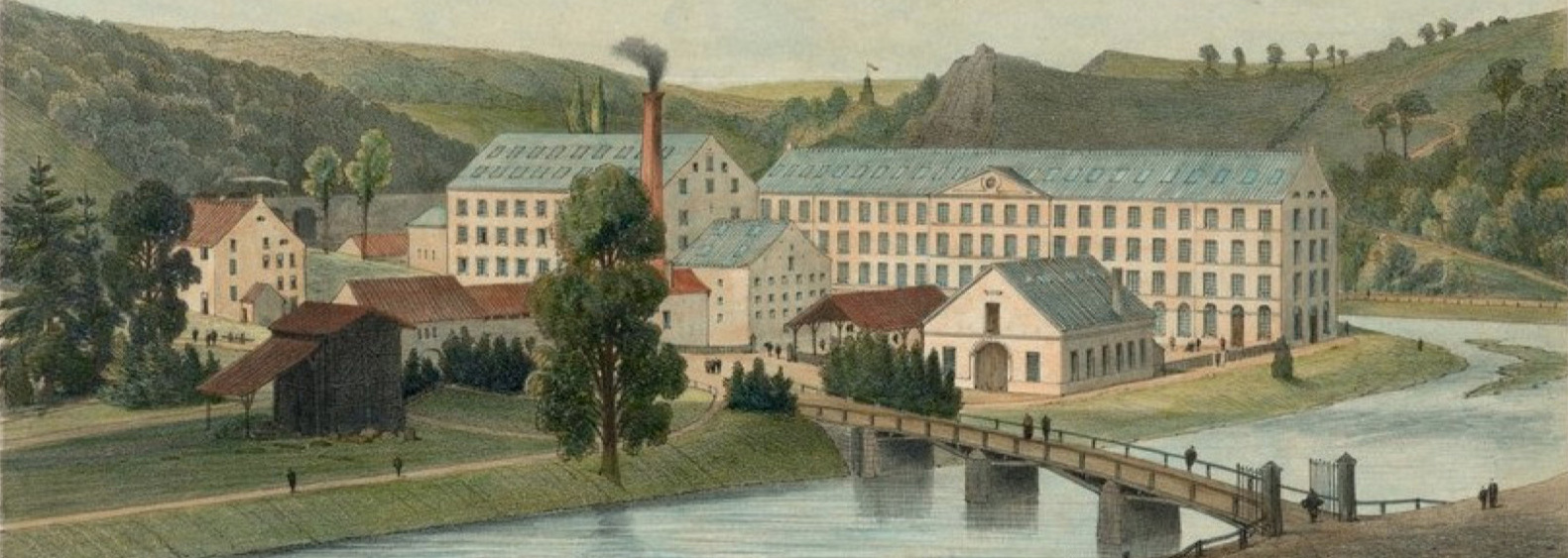 Lithografie van de wolfabriek Lieutenant & Peltzer aan de rivier de Vesdre in Pepinster, België, afgedrukt in het album La Belgique Industrielle uit 1850. In 1921 kwam het bedrijf onder de naam Textile de Pepinster in handen van de Maastrichtse ondernemers en broers Jules (II) en Georges Regout, echtgenoten van de zussen Adrienne en Jeanne Lieutenant, dochters van Alfred Lieutenant. De fabriek sloot in 1976.